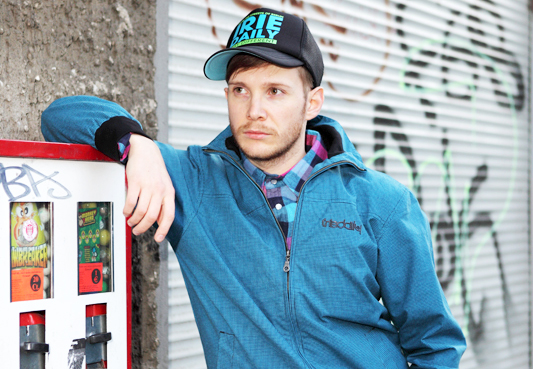 Nis-Momme Stockmann, Berlin, 2009